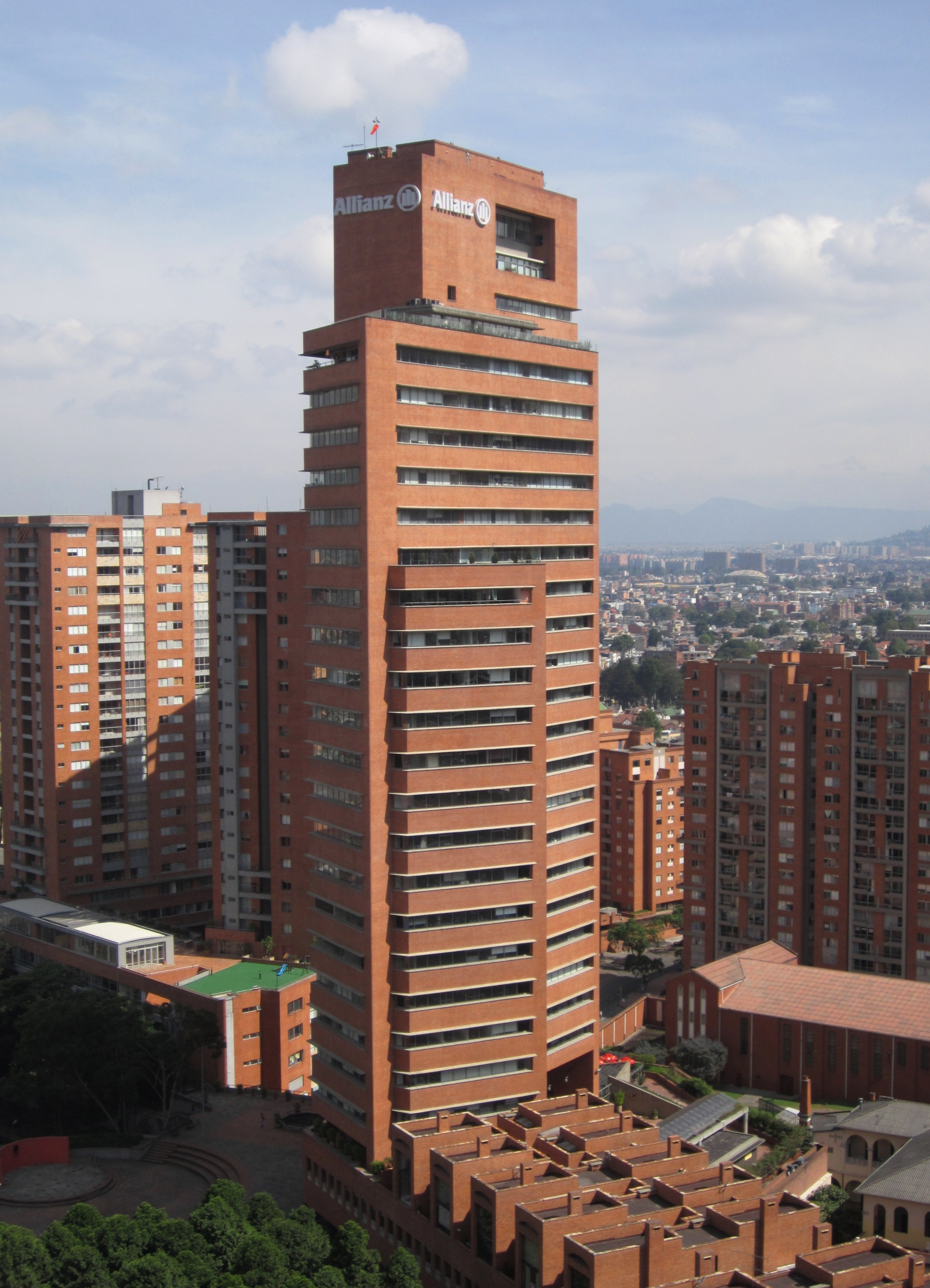 Sector de Bavaria - Bogotá, torre Allianz, antigua Colseguros.